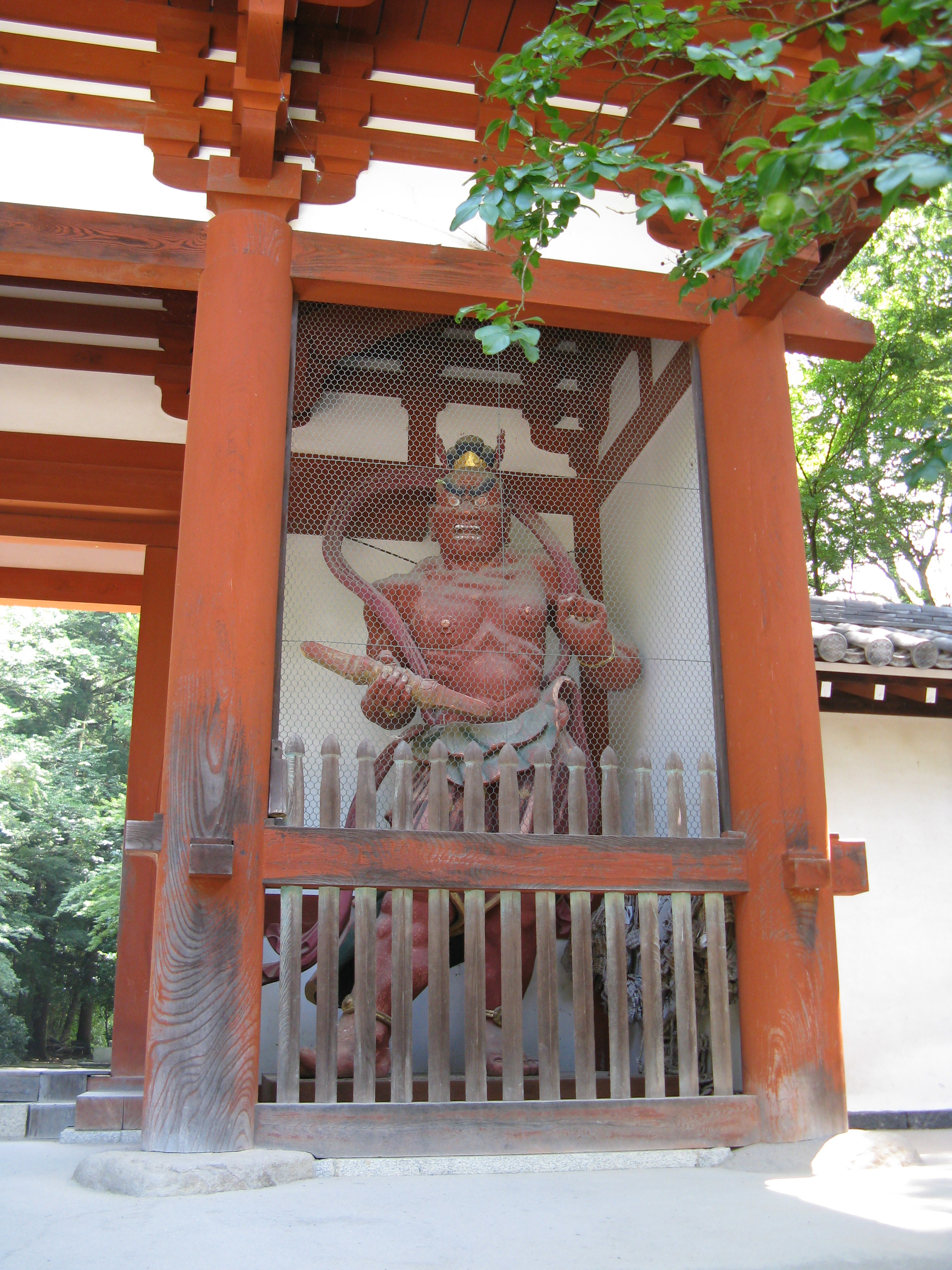 室生寺 仁王門